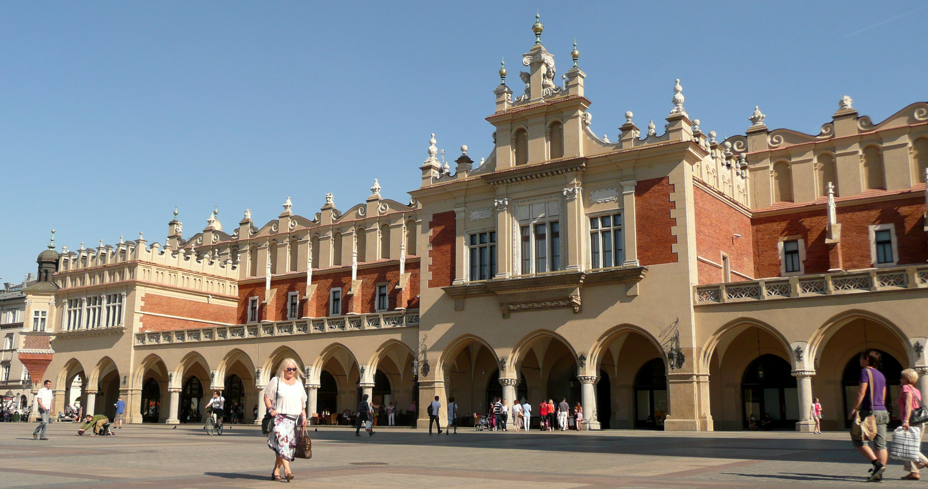 Kraków, Rynek Główny - sukiennice, 1344-1392, 1557-1559, 1875-1879